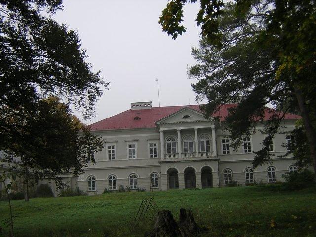 Kaštieľ